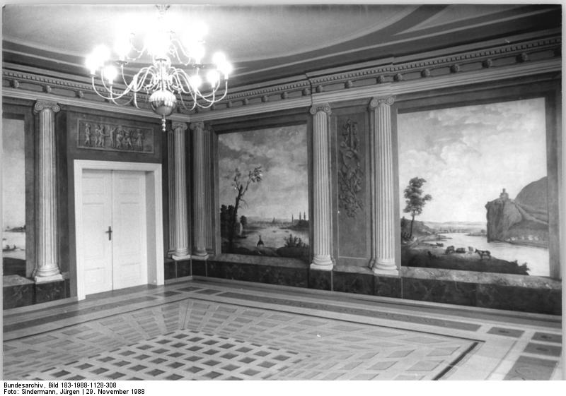 Stralsund, Festsaal ADN-ZB Sindermann 29.11.1988 Bez. Rostock: In einem rekonstruierten historischen Doppelhaus am Alten Markt von Stralsund befindet sich dieser schöne Festsaal, der ehemalige Salon. Die seltene Raumbemalung mit Flußlandschaften stammt von dem 1807 verstorbenen deutschen Maler Philipp Hackert. Bei der Rekonstruktion des Hauses durch polnische Spezialisten wurde auch der sieben mal sieben Meter große Salon mit den Gemälden sorgsam wiederhergestellt. Die Gemälde wurden auf Tapeten gemalt. Information added by Wikimedia users.Das Bild zeigt den Hackert'schen Tapetensaal (benannt nach dem Künstler Jakob Philipp Hackert) im Haus Ossenreyerstraße 1.